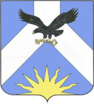 Герб города Минеральные Воды